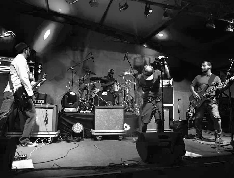 Astroparlante live.